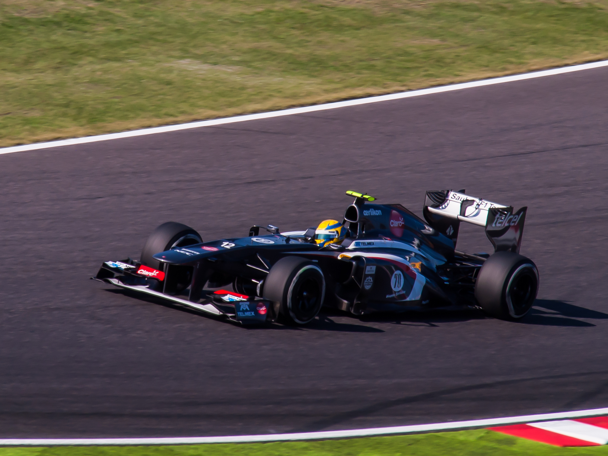 Esteban Gutiérrez au GP du Japon 2013